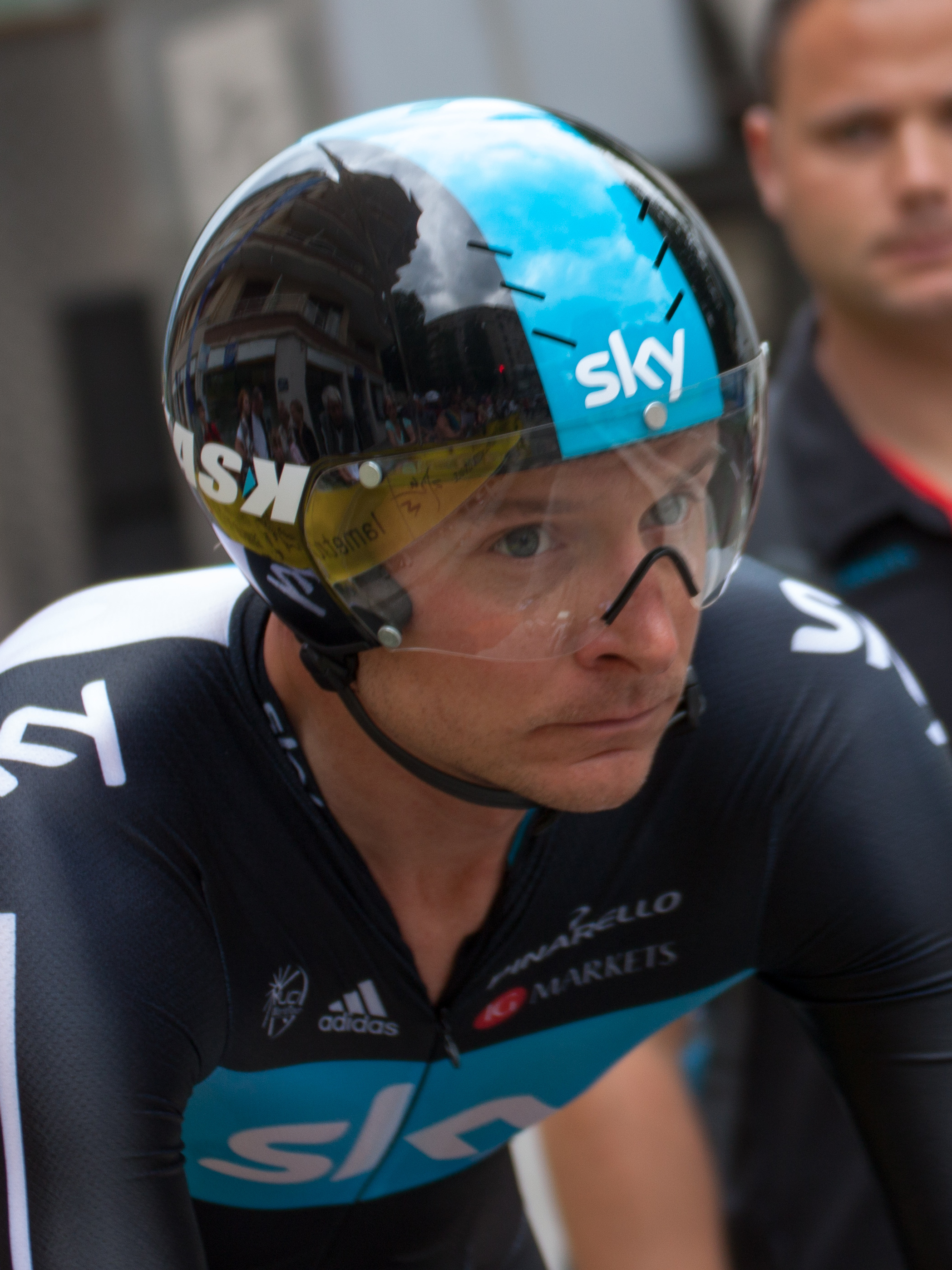 Danny Pate au Prologue du Critérium du Dauphiné 2012